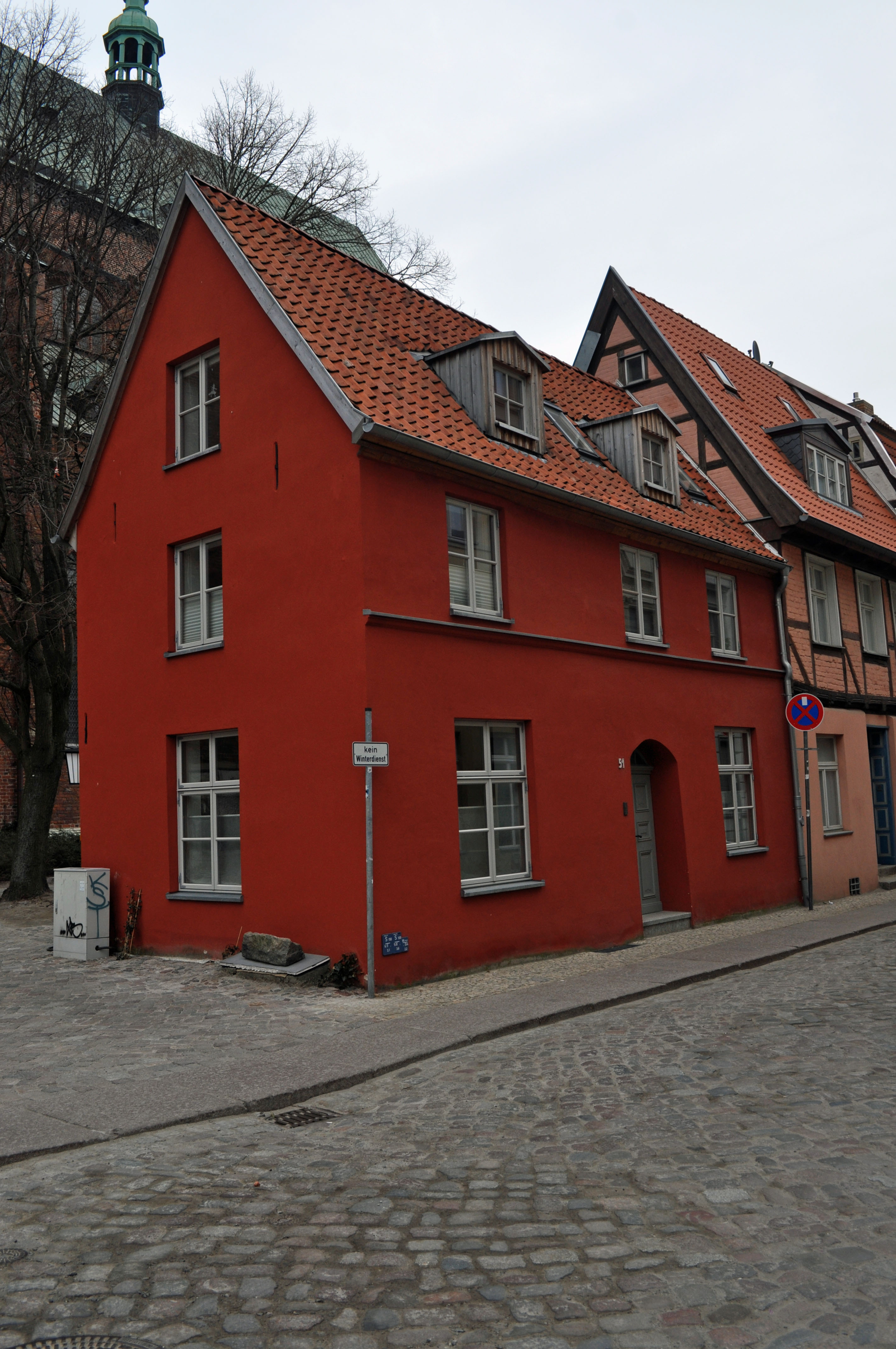 Gebäude bzw. Gebäudedetail in Stralsund. Straße und Hausnummer siehe Dateiname.